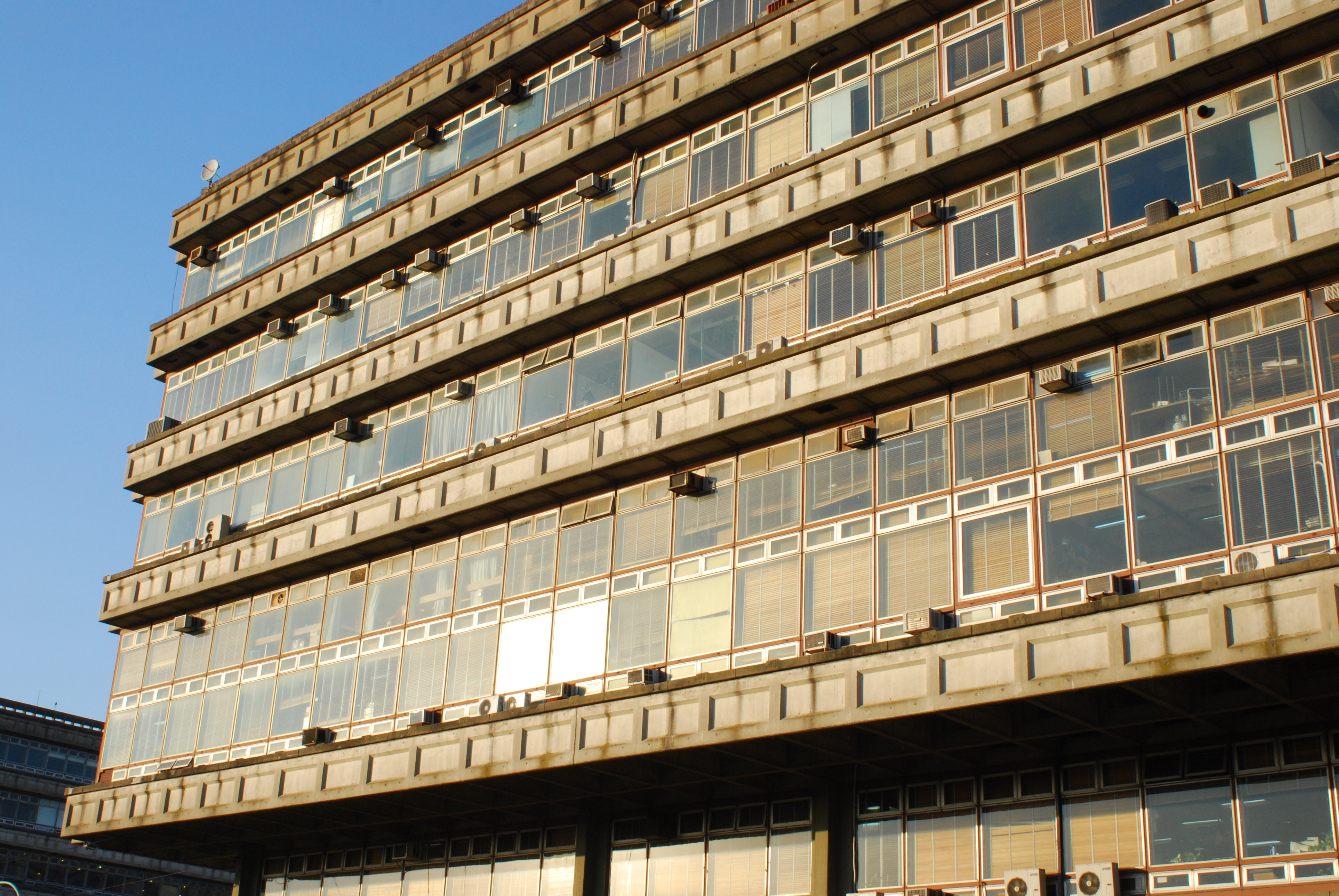 Pabellones 2 de la ciudad universitaria de Buenos Aires, Argentina, noviembre 2008